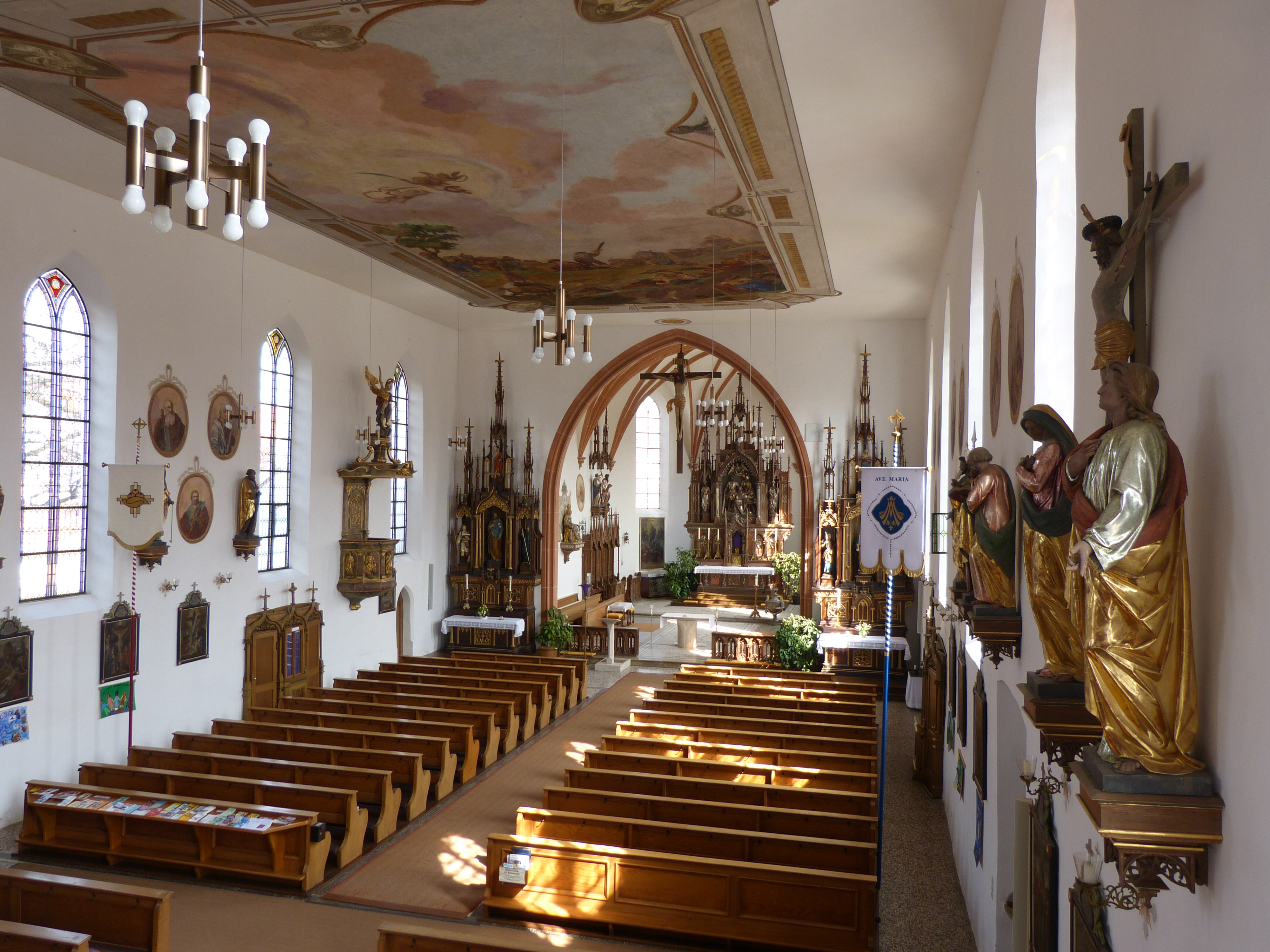 St. Jacobus maior, Markt Rettenbach, Landkreis Unterallgäu, Bayern